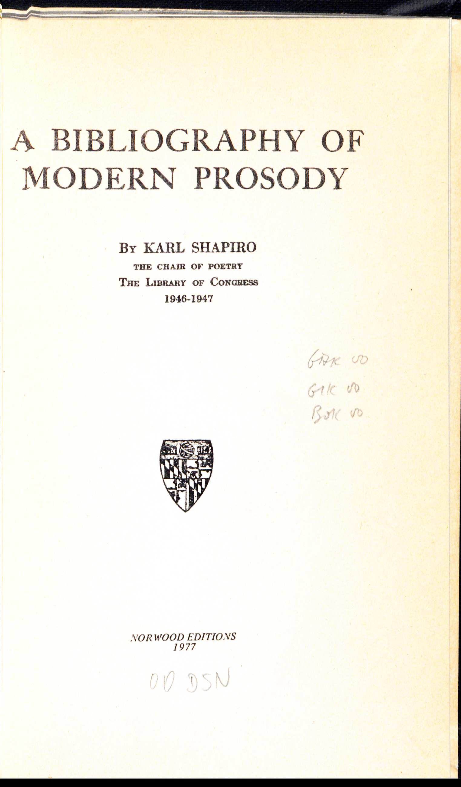 Karl Shapiro: A Bibliography of Modern Prosody. Baltimore : Johns Hopkins, 1948